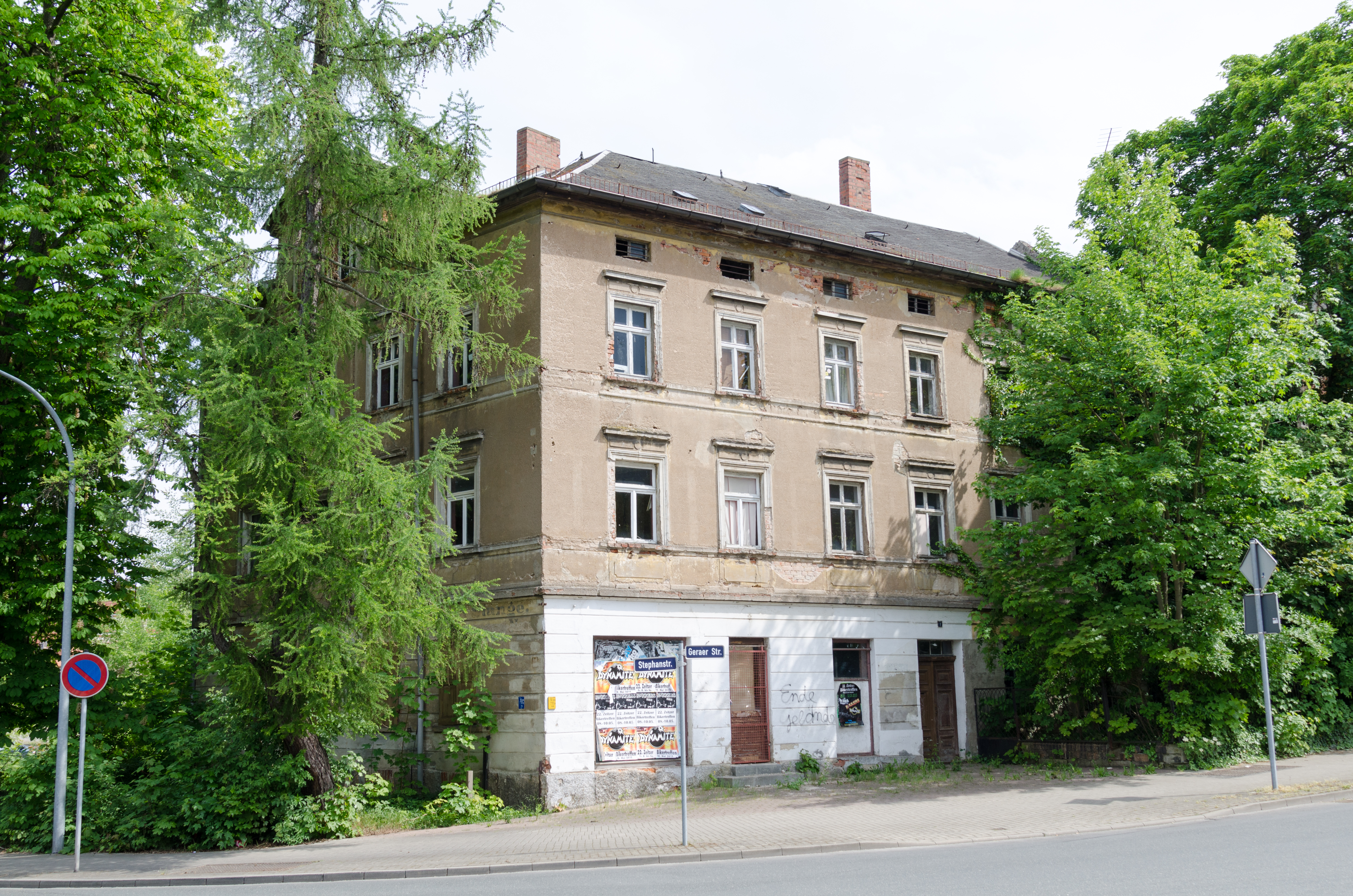 Zeitz, Geraer Straße 1